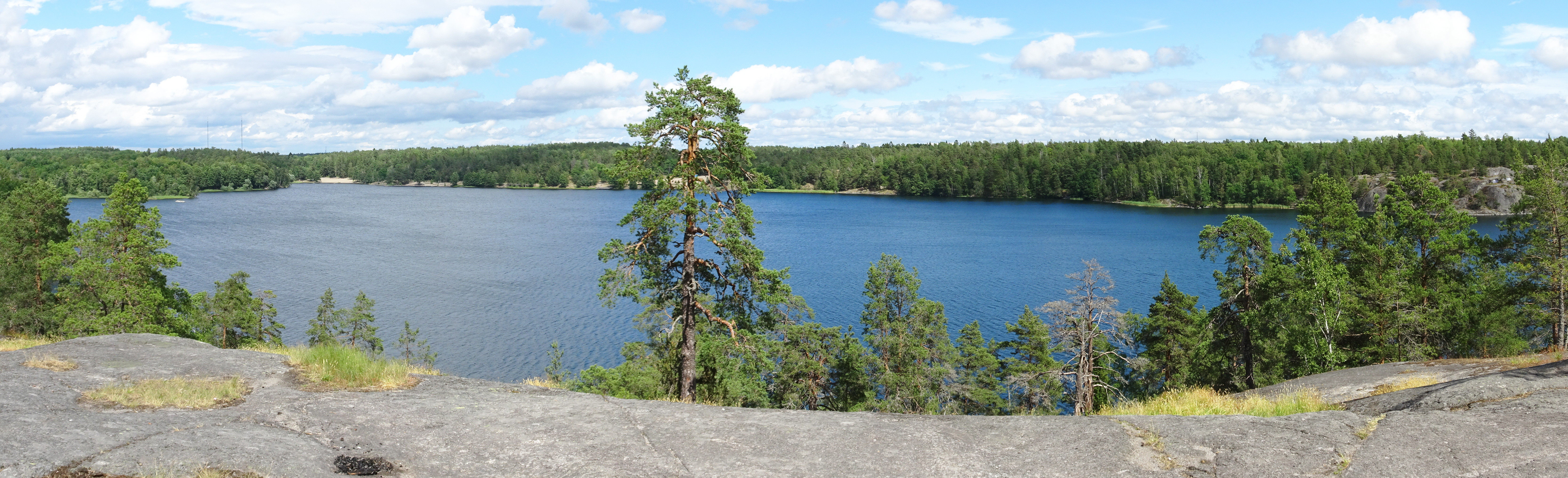 Panorama över Flaten med Flatenbadet på andra sidan